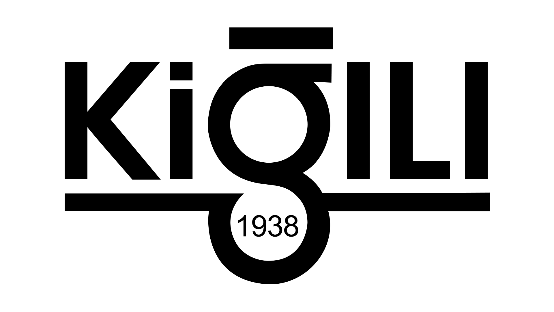 kiğılı logo